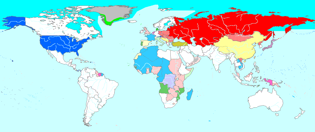 Il mondo nel 1954.